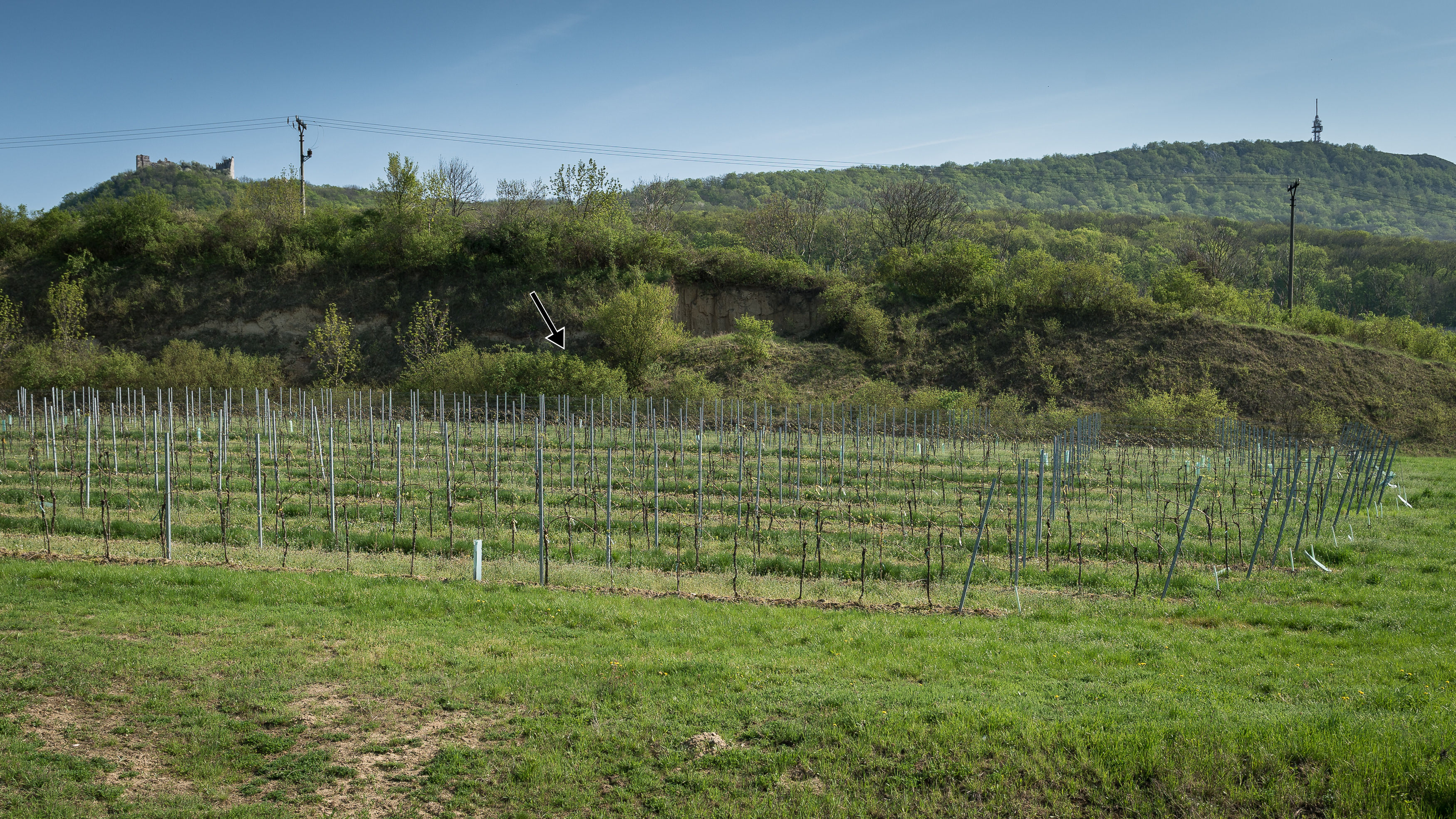 Dolní Věstonice II mit den Bereichen "site-top" (drei große ovale Besiedlungszonen K7, K8, K9, etwa 10 m vor der Böschung und auf Höhe der Pfeilspitze befand sich die Fundstelle der Dreifachbestattung. Der Löss wurde Ende der 1980er Jahre bis auf das heutige Niveau abgetragen), "southern edge" (Bildmitte, ein 1991 für eine UISPP-Exkursion freigelegter 4,5 m x 9 m großer Bereich am südlichen Rand der jungpaläolithischen Besiedlungszone S7) und rechts "western slope" mit den Fundkonzentrationen K1, K4-K6, S1-S4 und S8. (K = Grabung Bohuslav Klíma, S = Grabung Jiří Svoboda) Koordinaten = Kameraposition